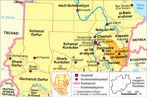 Politische Karte des Sudan (Bundesstaat al-Qadarif)